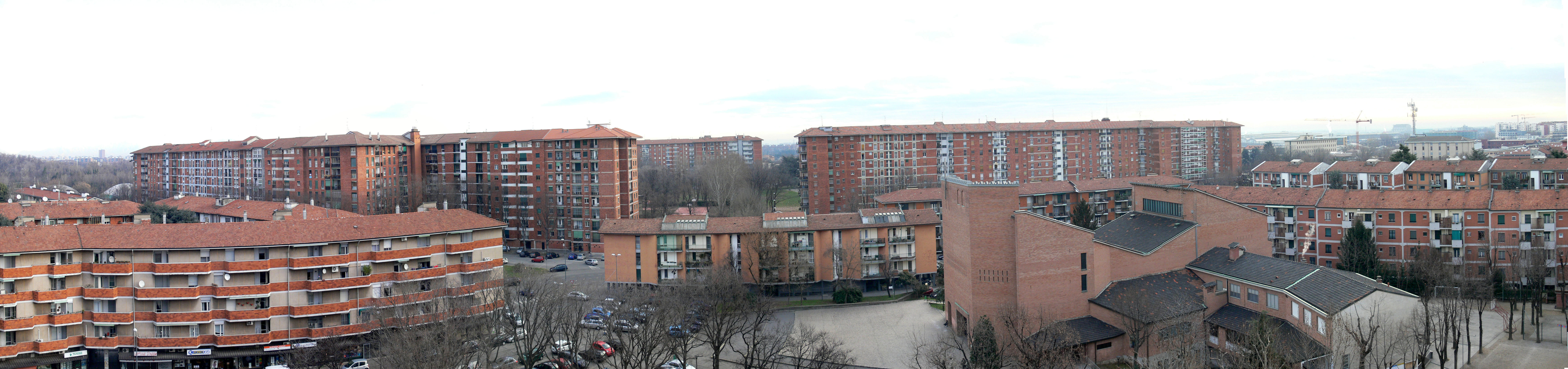 Fotografia panoramica del Quartiere Feltre di Milano